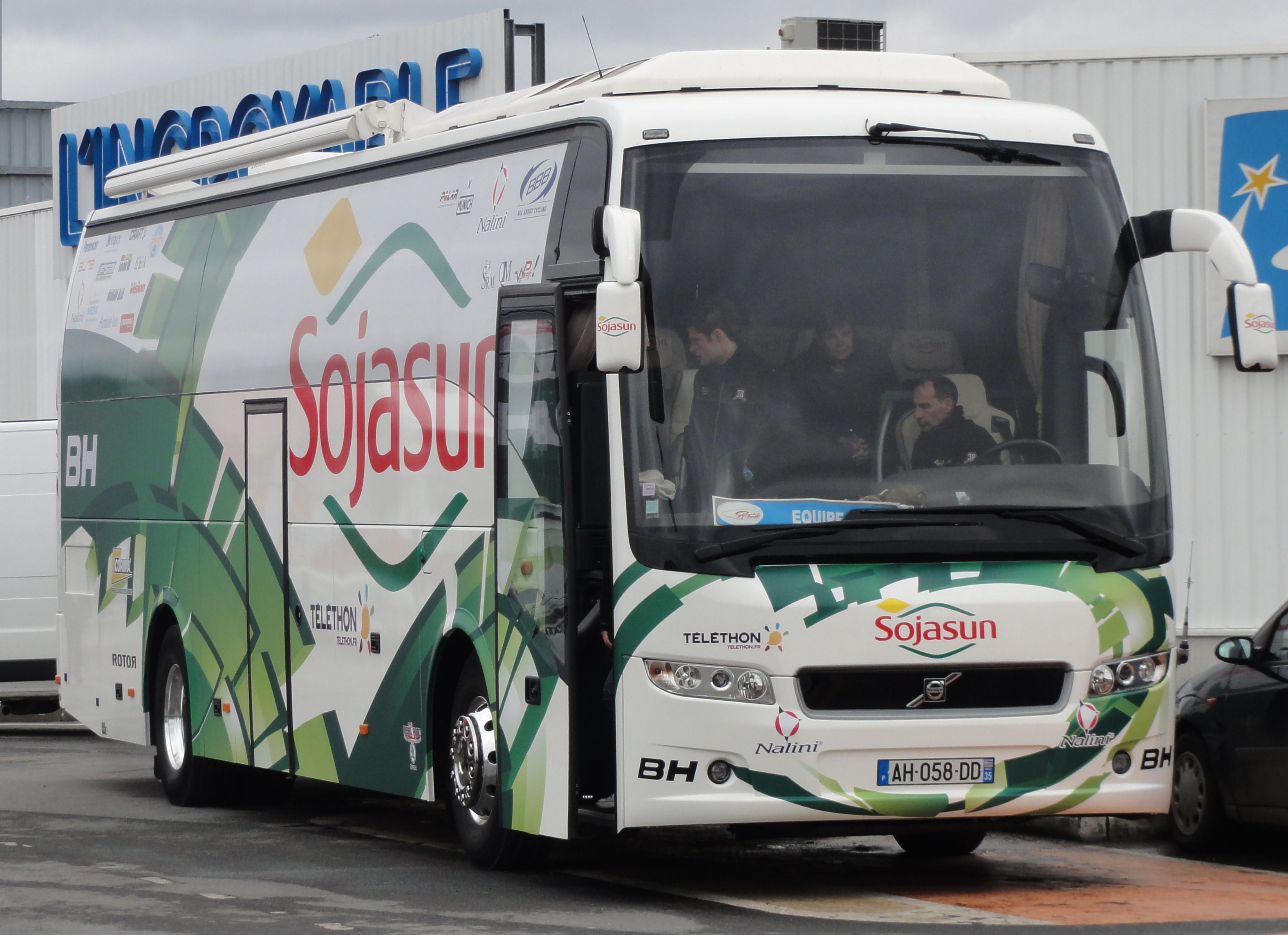 Reportage photographique réalisé le mardi 11 avril 2013 durant l'édition 2013 du Grand Prix de Denain à Denain, Nord, Nord-Pas-de-Calais, France.